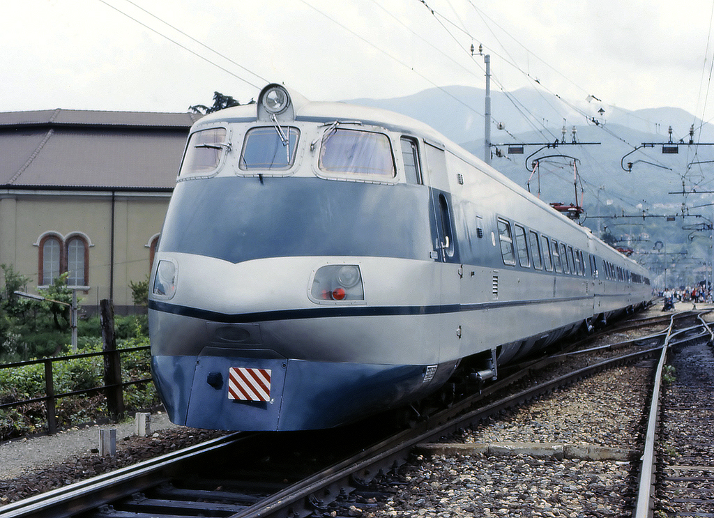 Elettrotreno FS ETR.401 in ingresso a Luino in occasione della manifestazione "Locoemozioni"